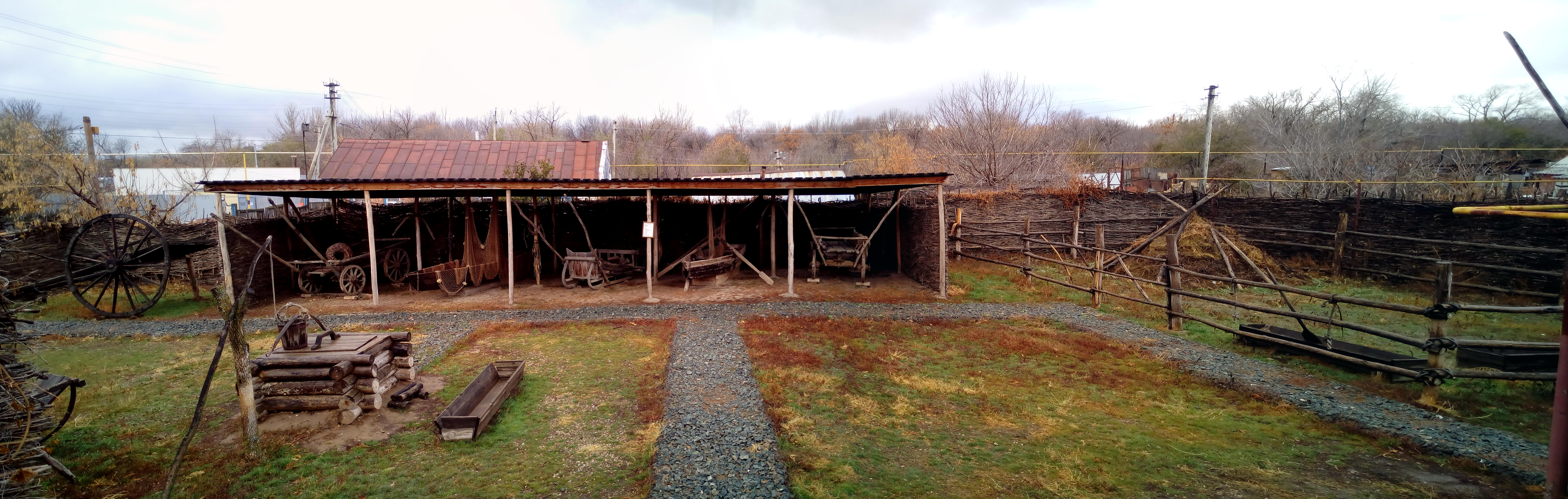 Дом-музей Емельяна Пугачева